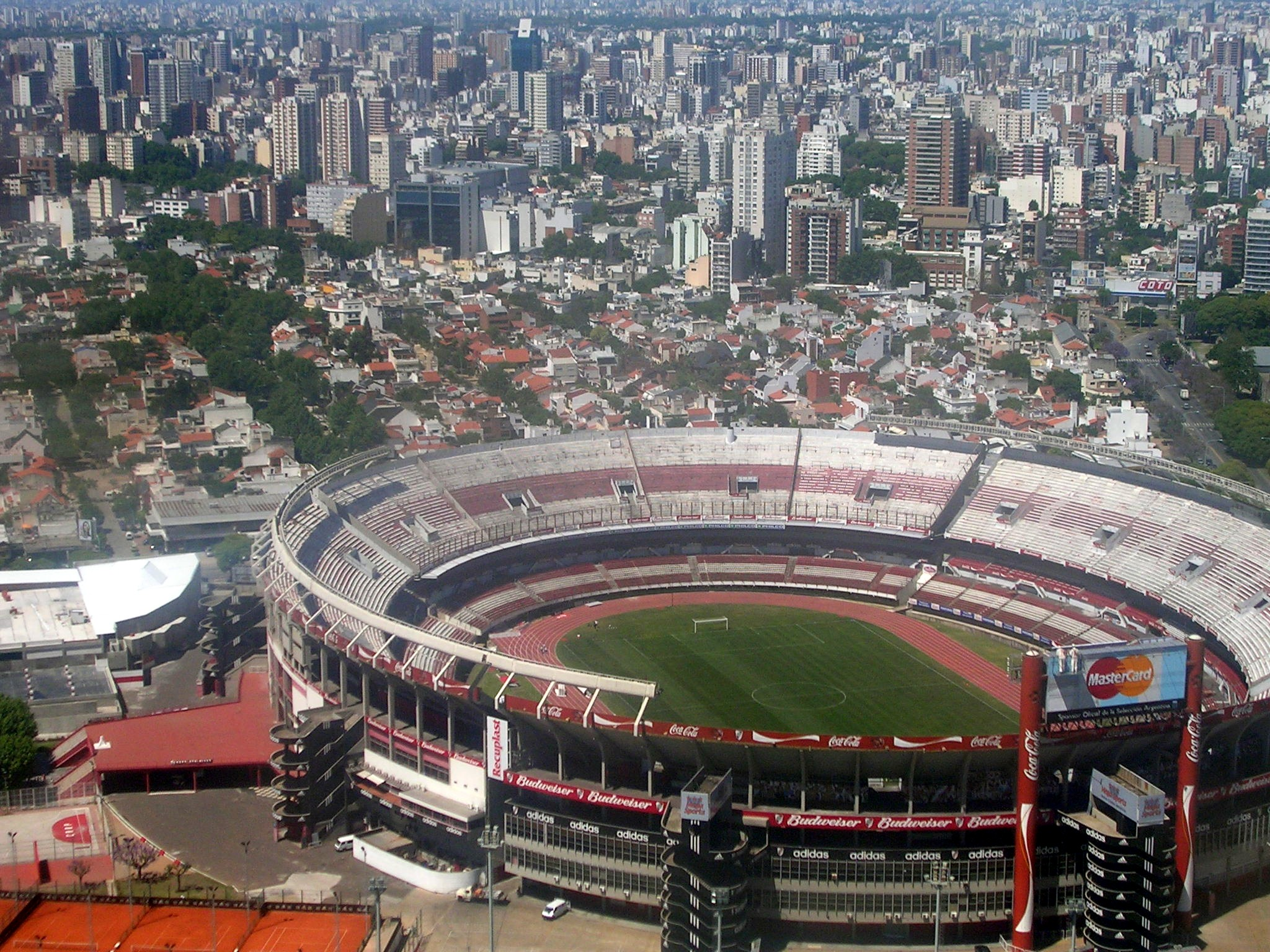 Estadio Monumental de River Plate en una foto tomada desde un avión de Aerolíneas Argentinas en 2005